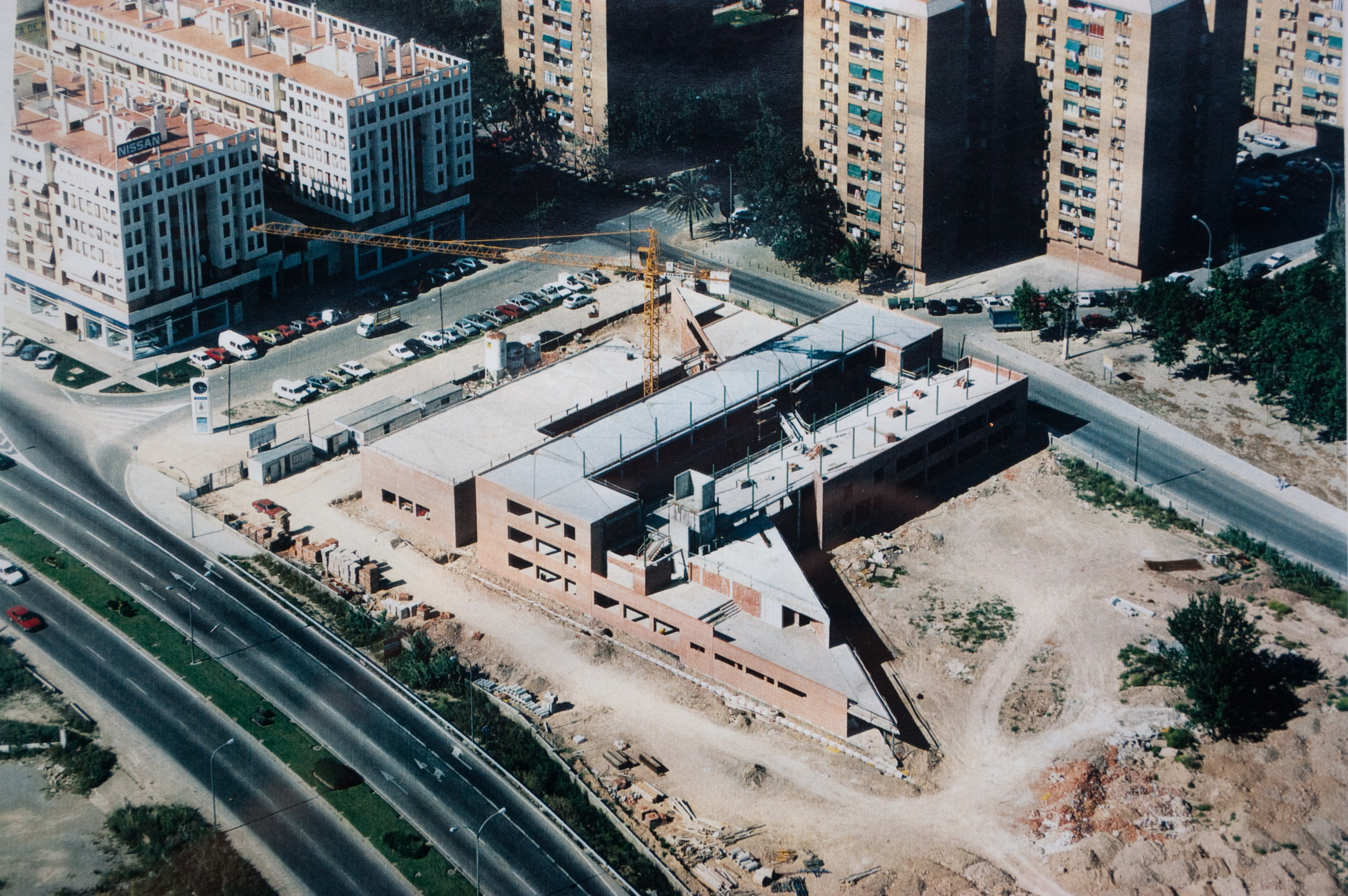 Vista de la planta y alrededores del CIPFP Ausiàs March en su fase de contrucción